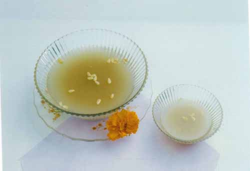 식혜, Sikhye, korean traditional drink for dessert.